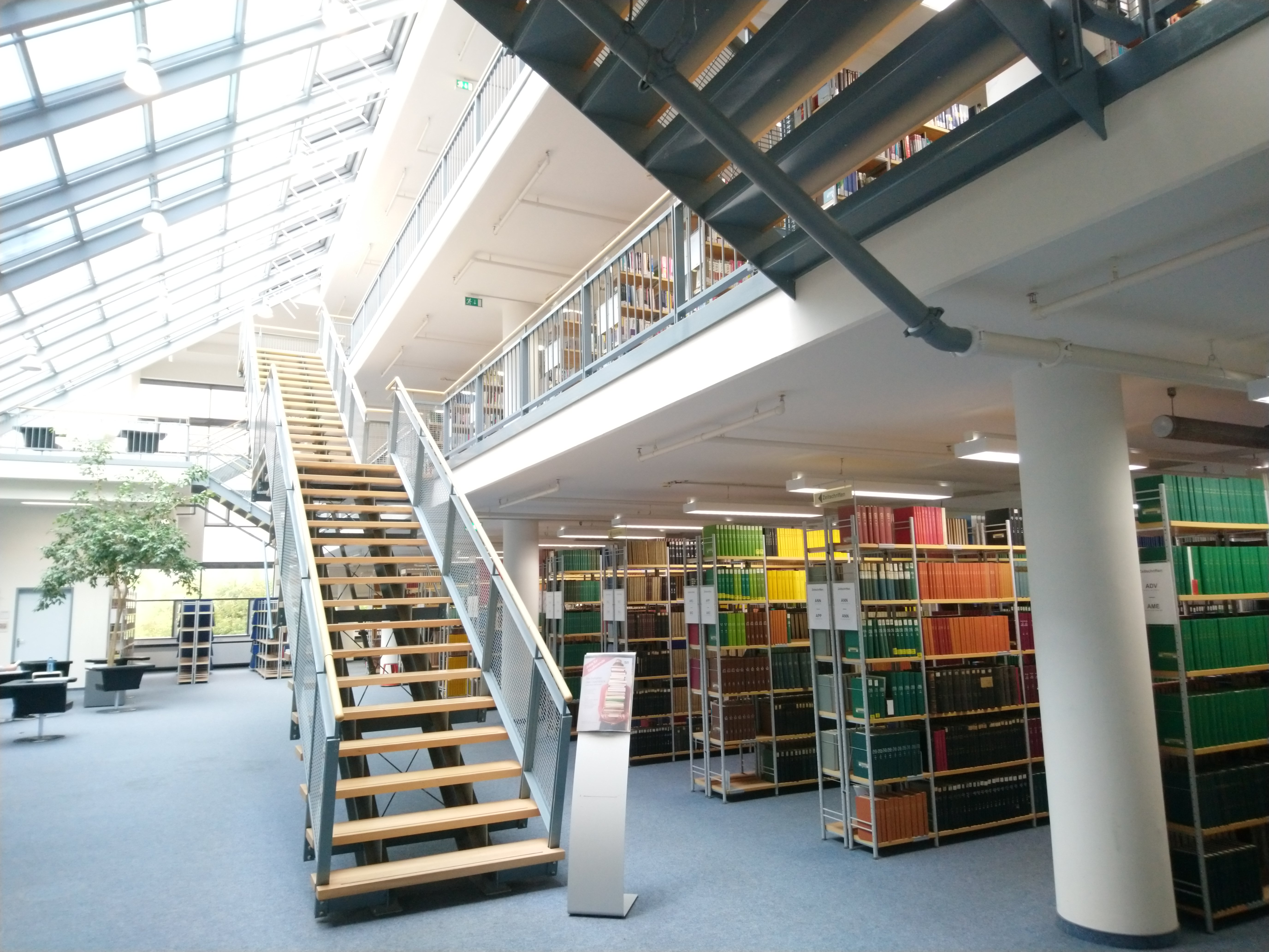 Innenansicht der Bibliothek der Fakultäten Informatik und Mathematik der TUM